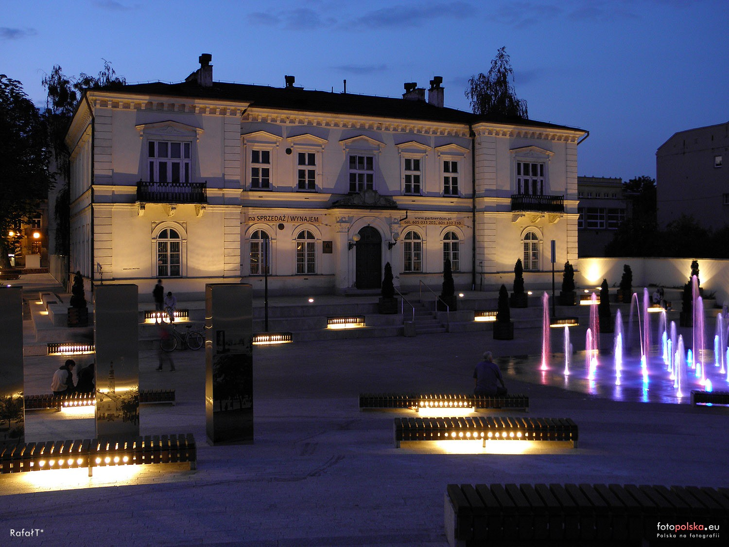 Budynek dawnego Towarzystwa Kredytowego Ziemskiego nocą